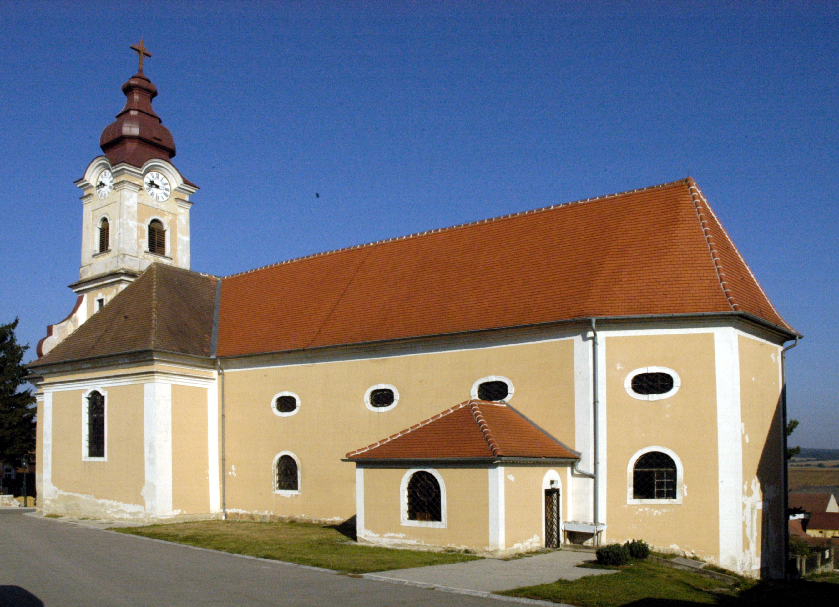 katholische Pfarrkirche Mariae Heimsuchung in Zemling, Gemeinde Hohenwarth-Mühlbach am Manhartsberg.